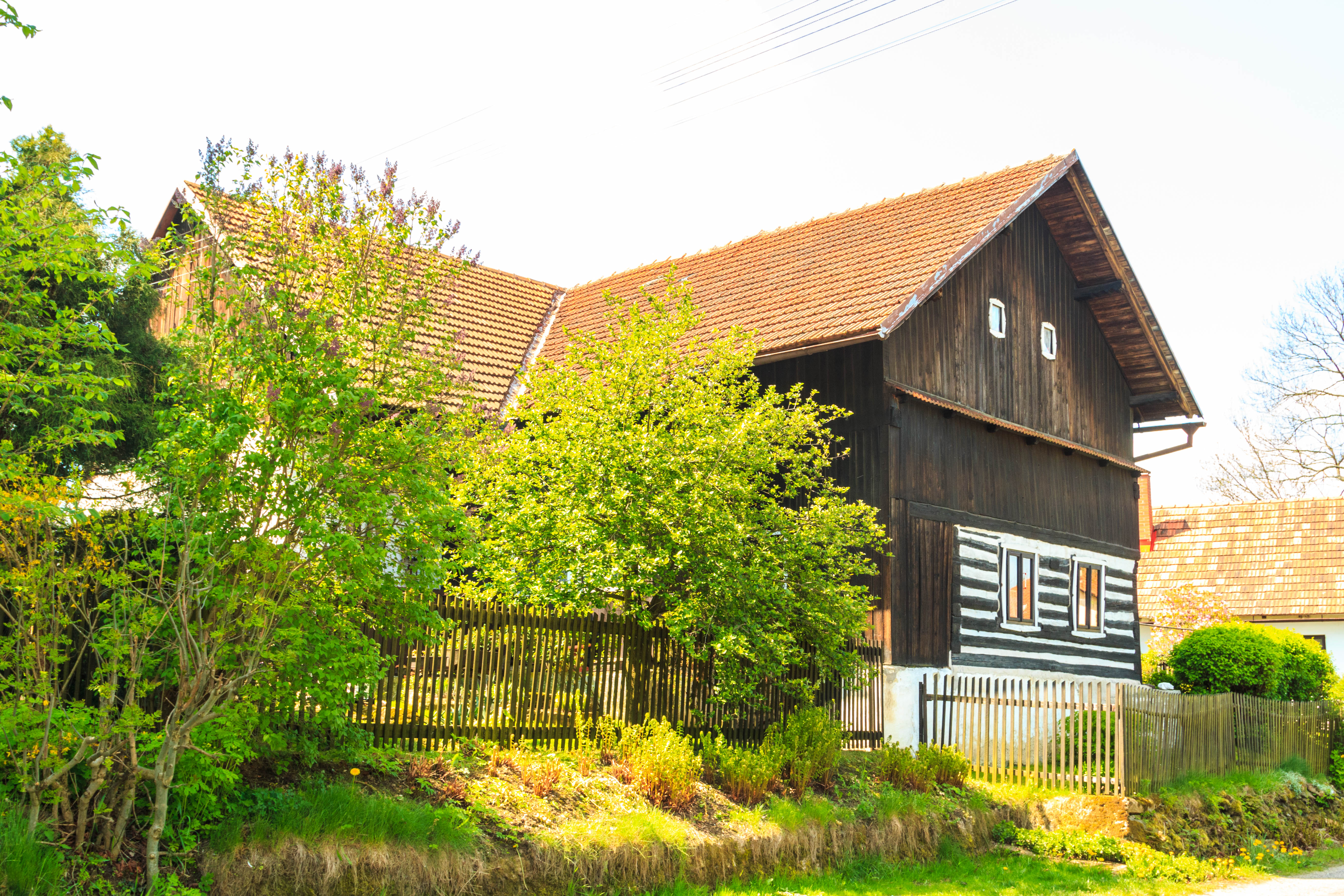 Česká Rybná u Proseče - čp. 102